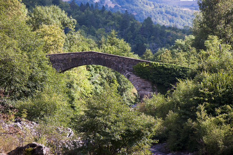 Pont De Barre Florac